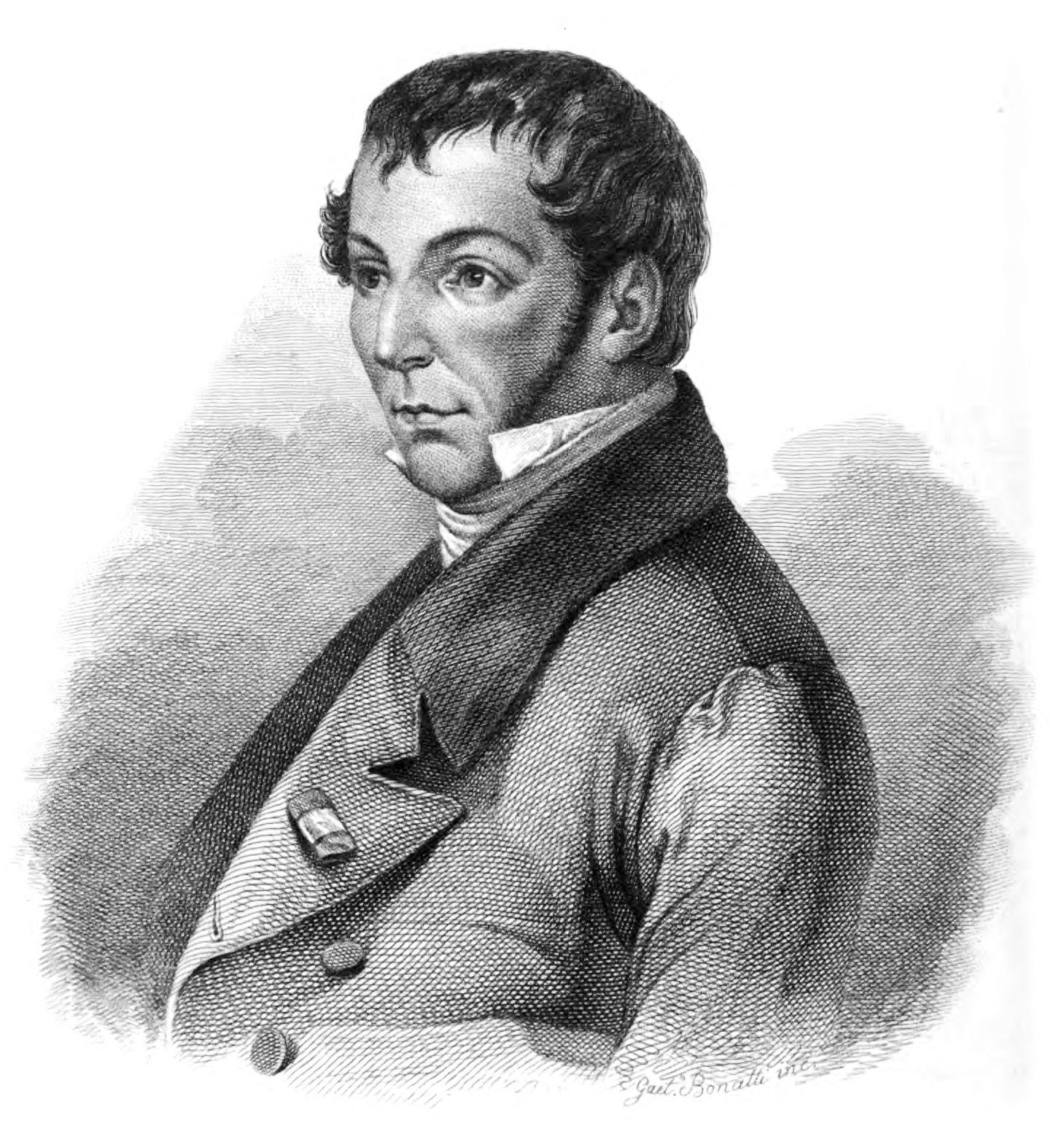 Il rivoluzionario Alerino Palma